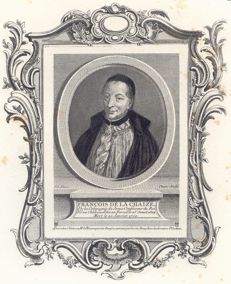 Gravure ancienne du père de La Chaize, tirée de HAMY, A.: 'Galerie illustrée de la Compagnie de Jésus', Paris, 1893.